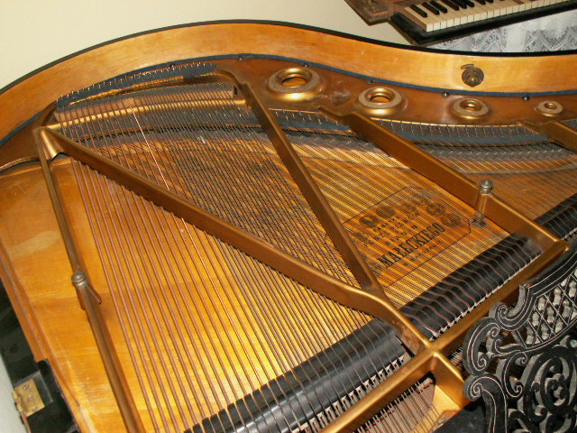 Wnętrze fortepianu Małecki z ok. 1886 r. (płyta rezonansowa z logiem firmowym, rama żeliwna wraz z naciągiem strun)